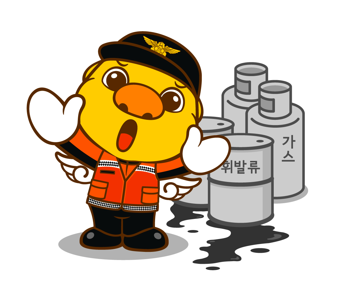 위험물 주의